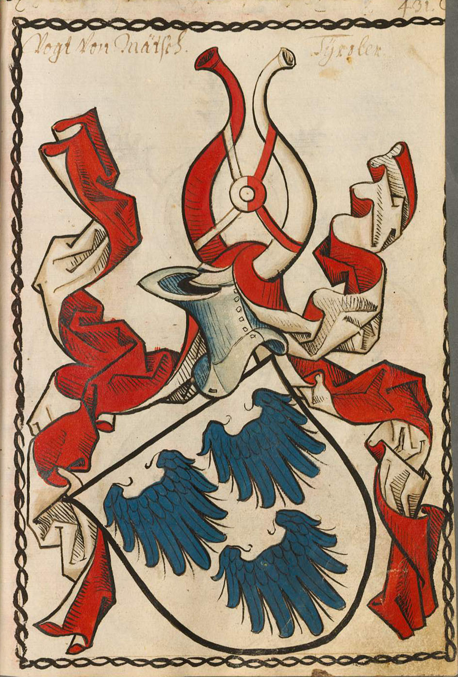 Scheibler'sches Wappenbuch , älterer Teil Matsch